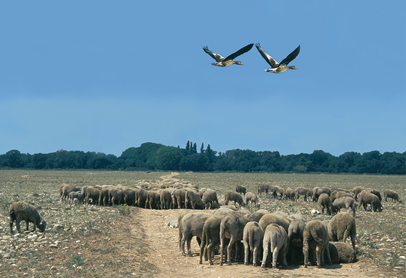 Schafe in der Crau